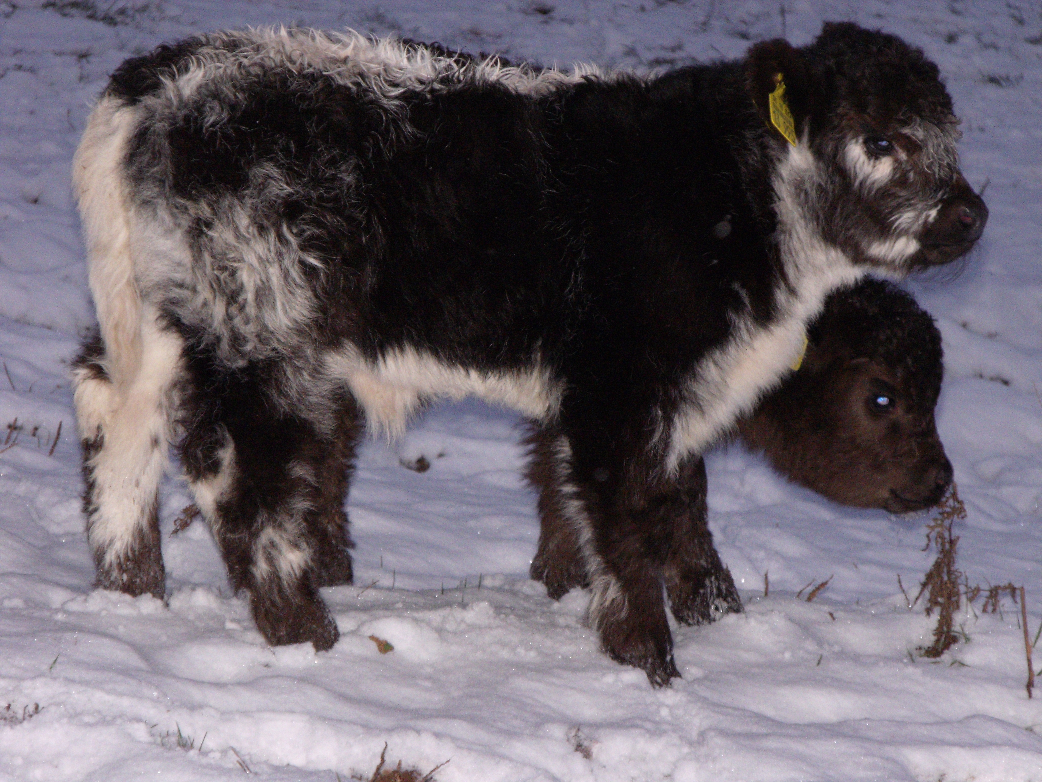 Galloway "Emma" vom Gut Lindenhof